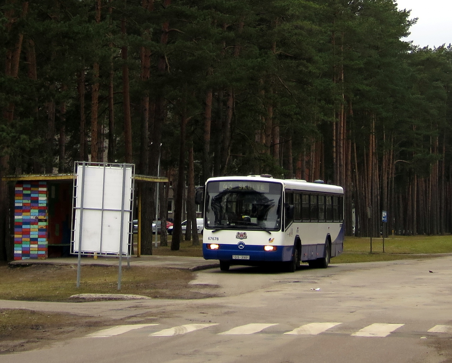 43. autobuss galapunktā Skultē